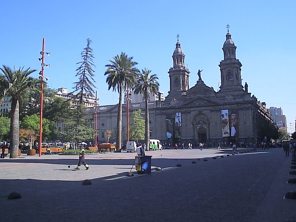 Plaza de Armas y vista del frontis de la Catedral Metropolitana